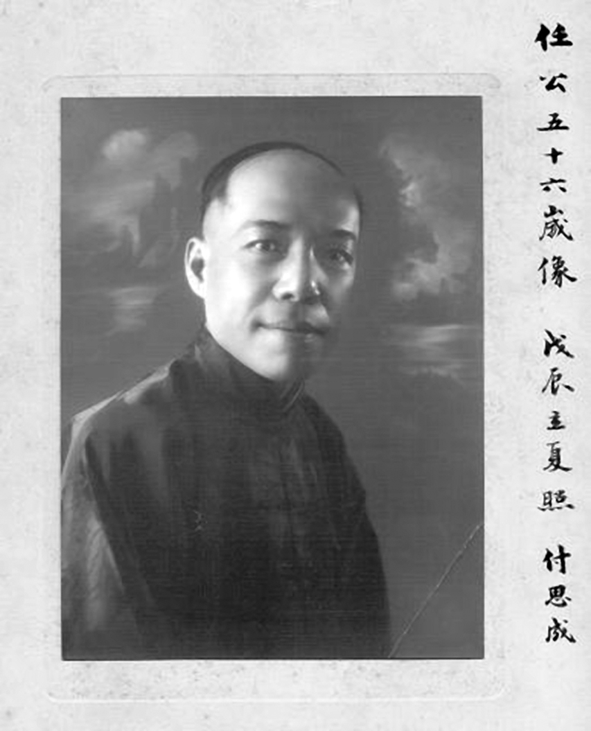 图为56岁的梁启超留影